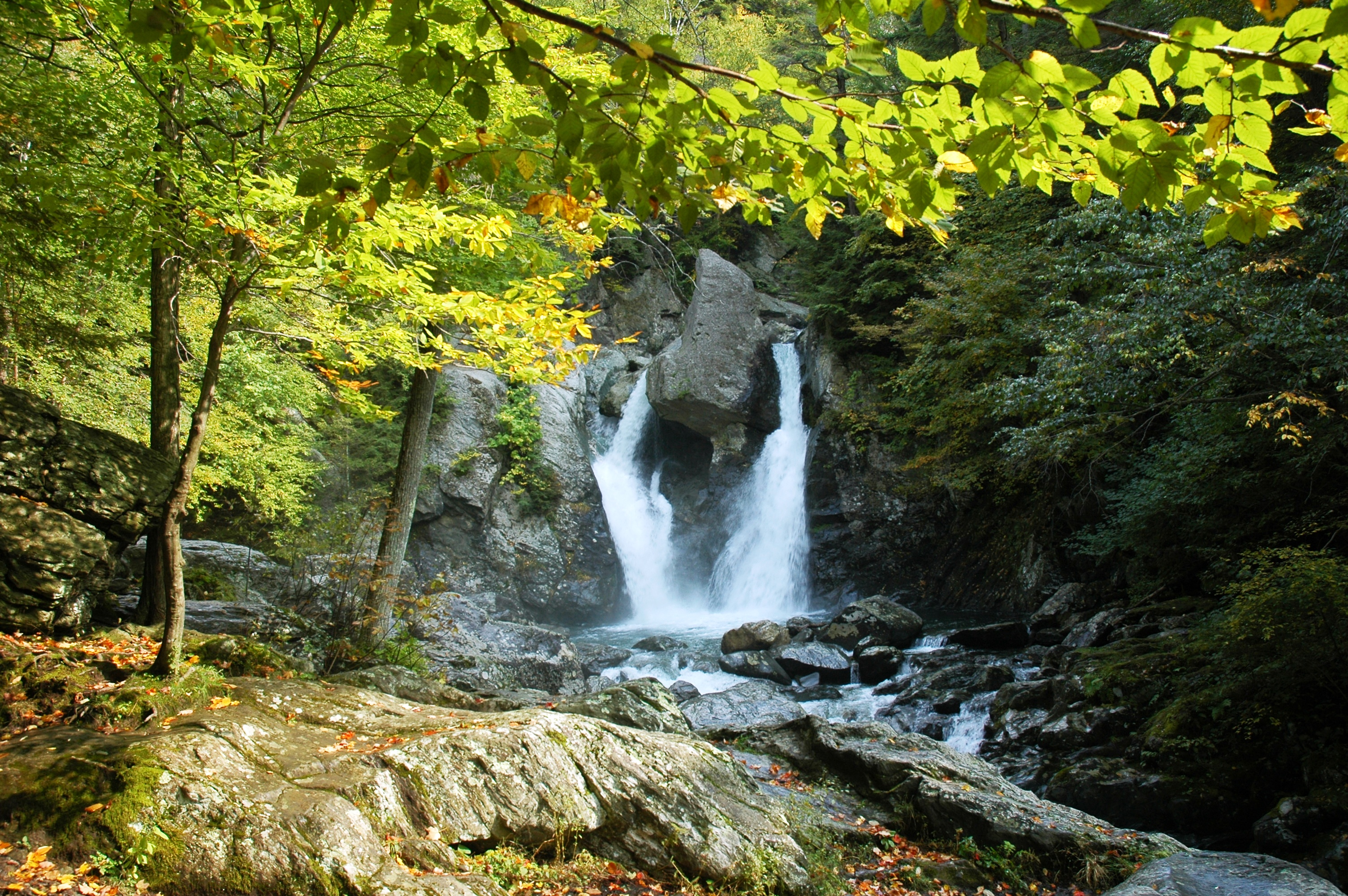 Slovak Paradise (Slovenský raj), Slovakia